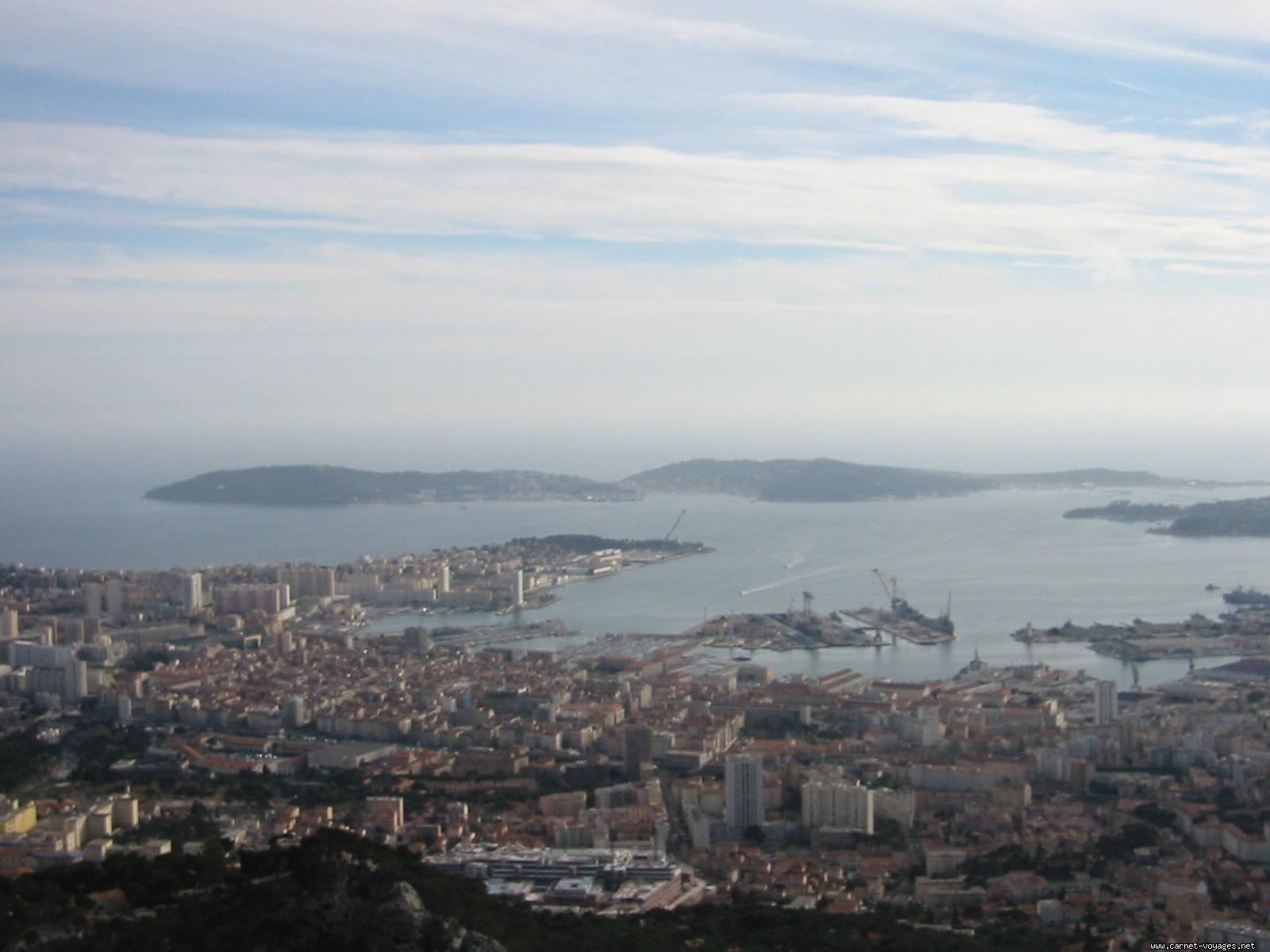 Description: La presqu'île de Saint Mandrier ferme la rade de Toulon. La photo est prise du haut du Mont Faron. Auteur: Juju ( Site